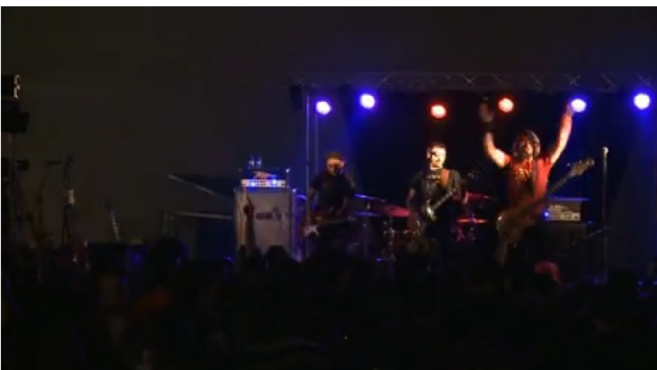 Asistentes a la V Edición del festival Carrasca Rock (24 y 25 Julio 2010)